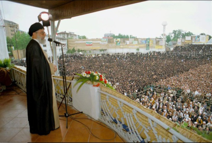 سخنرانی سید علی خامنه ای در رشت - 1380